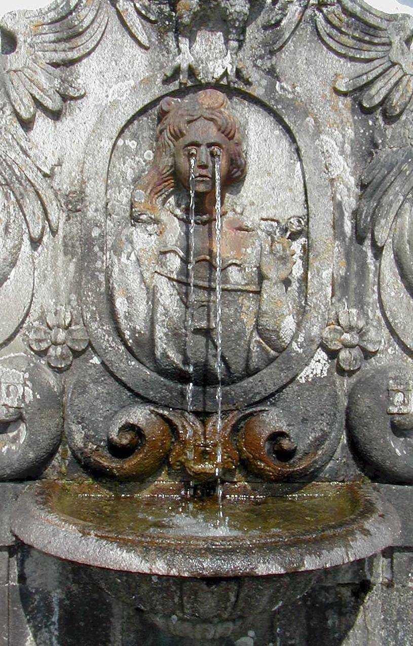 Fonte da visão nos escadórios do Bom Jesus em Braga Portugal Foto de Jose Goncalves